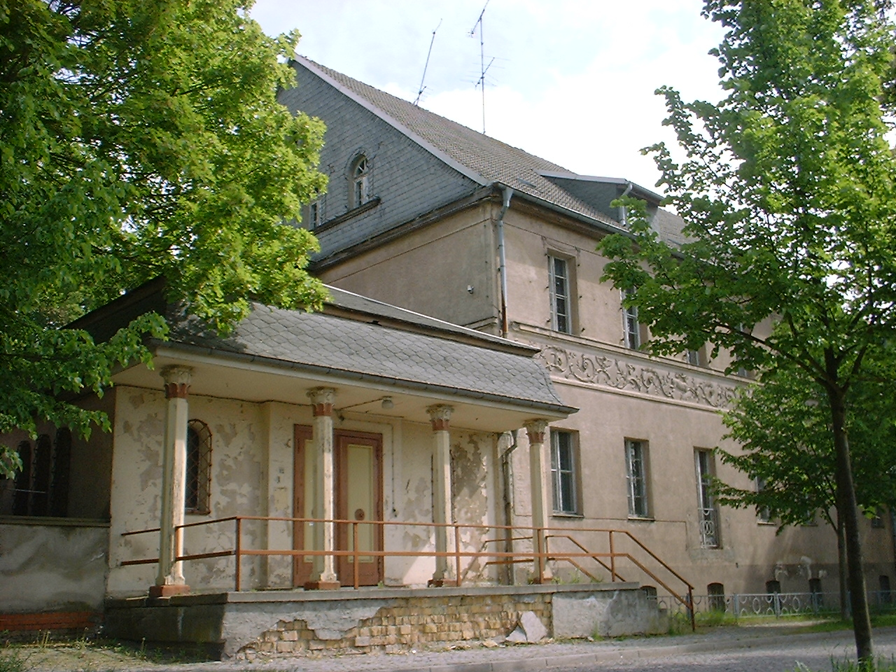 Villa Hirsch (Erich-Steinfurth-Str. 12) in der Messingwerksiedlung in Eberswalde, Deutschland